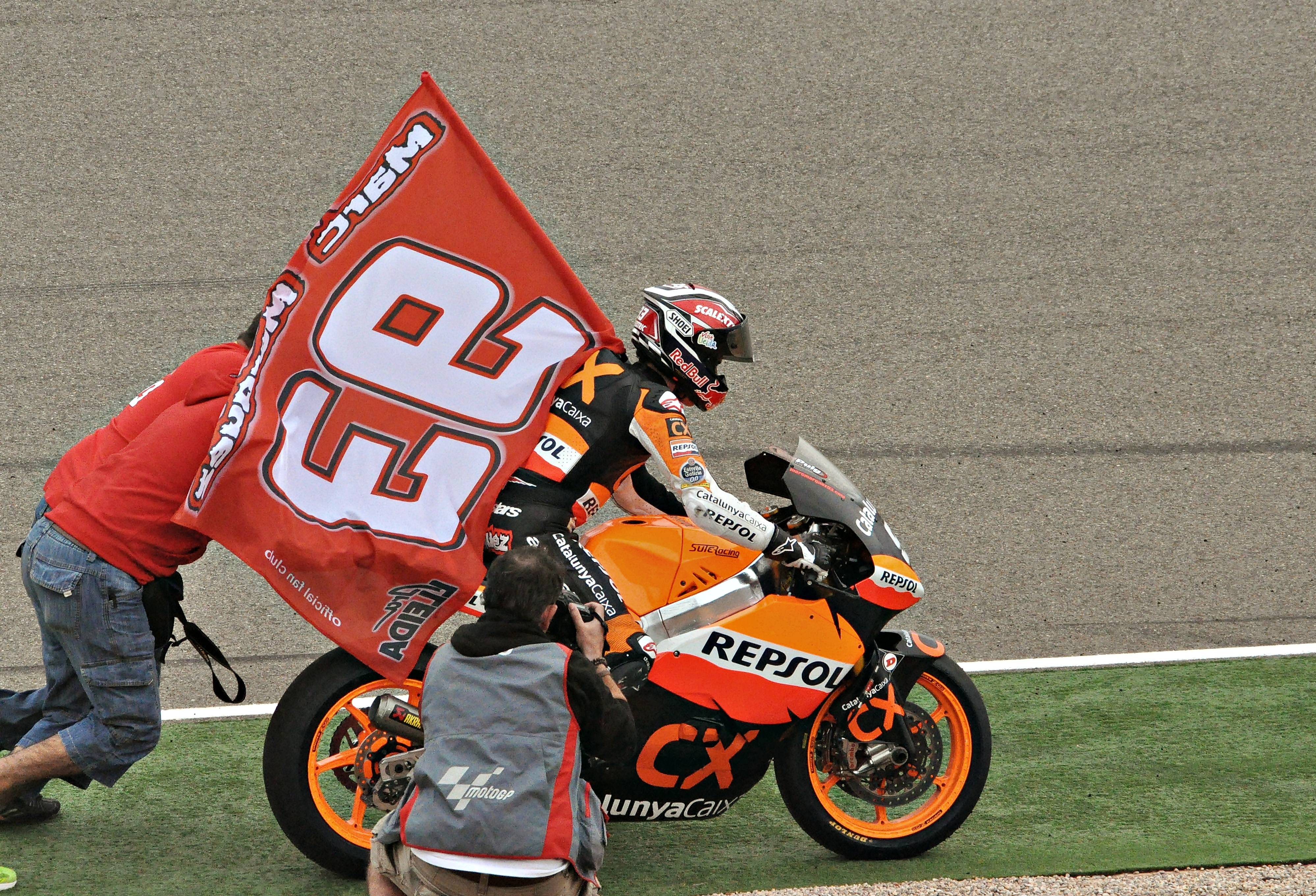 motorlan 2011 moto 2